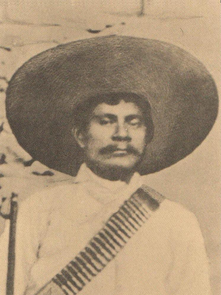 Zapatista General Julio A. Gómez